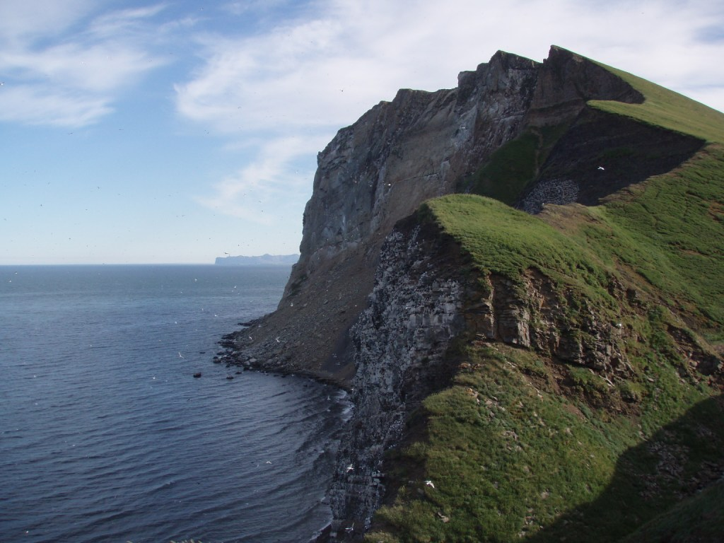 Cape Barykova from South